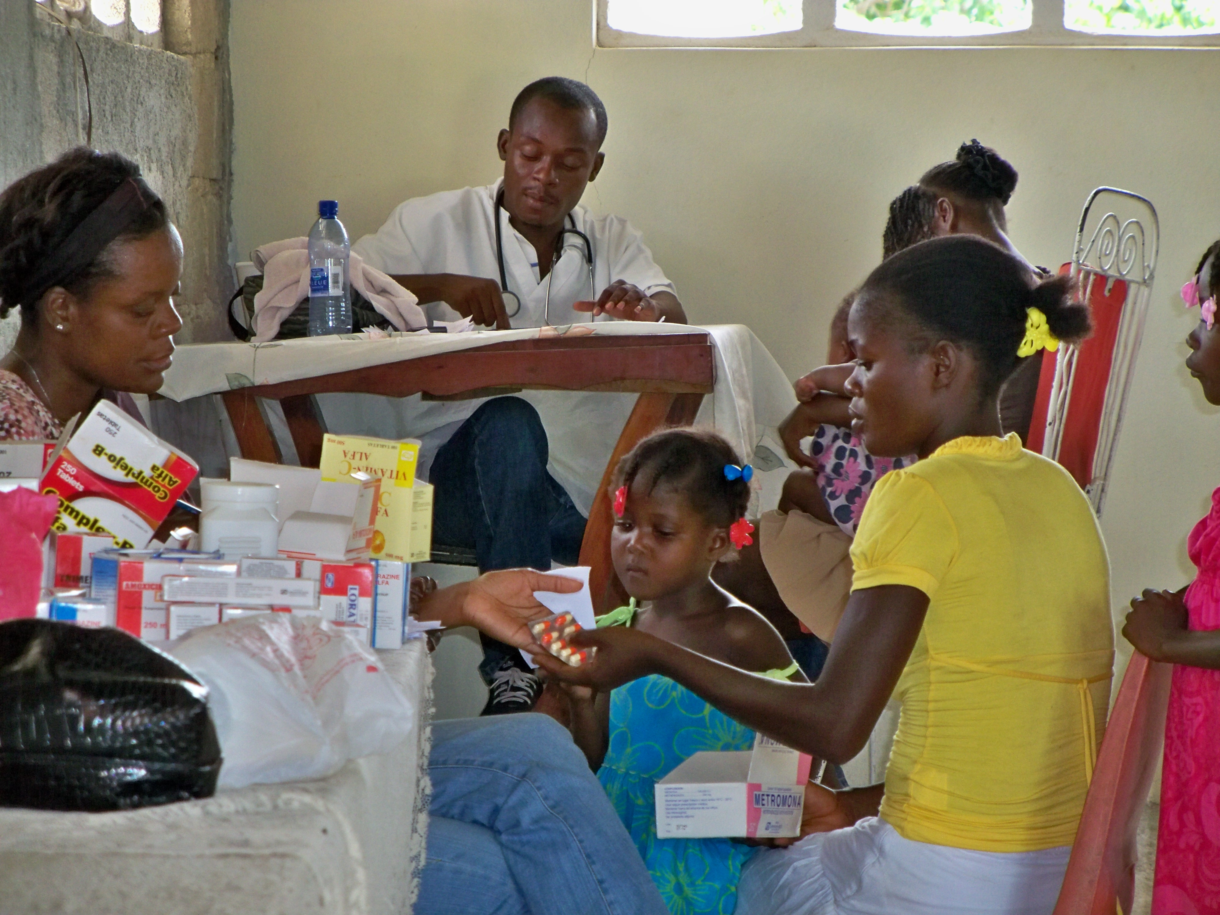 Atención primaria en salud a la población de Cabaret, Haití, tras el terremoto de 2010